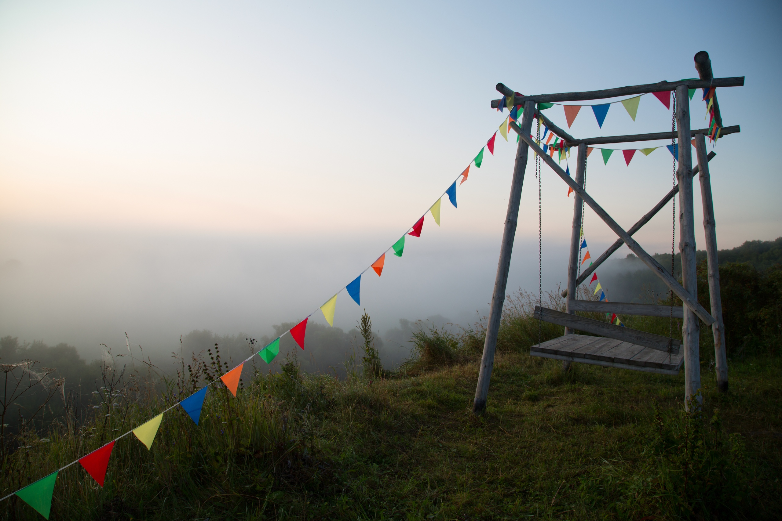 Качели в Междуречье